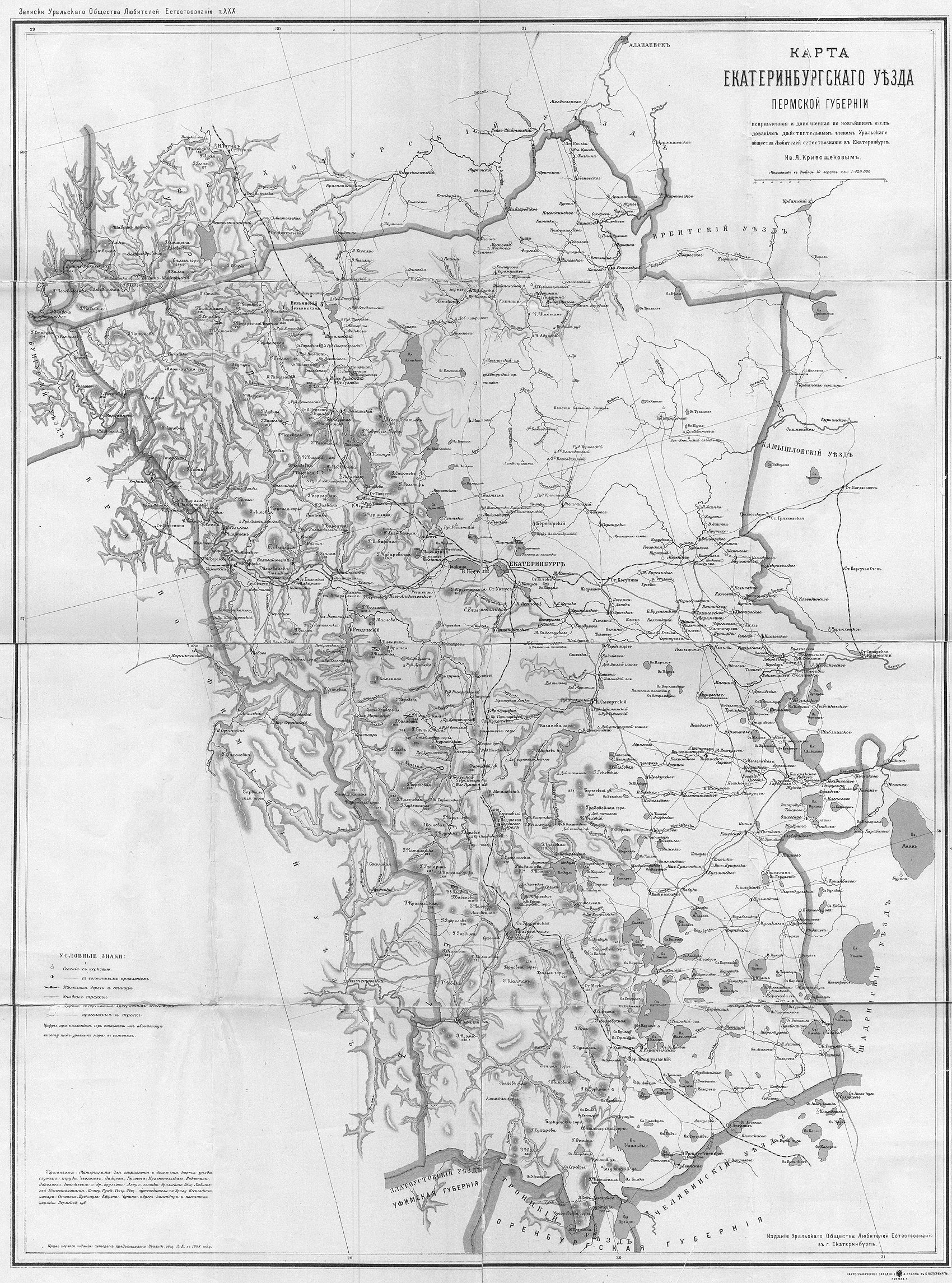 Карта Екатеринбургского уезда (1908) Издание Уральского общества любителей естествознания. Картографическое заведение А.Ильина в С.Петербурге.